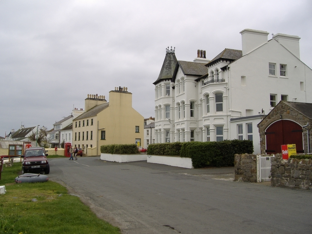 Derbyhaven Hotel